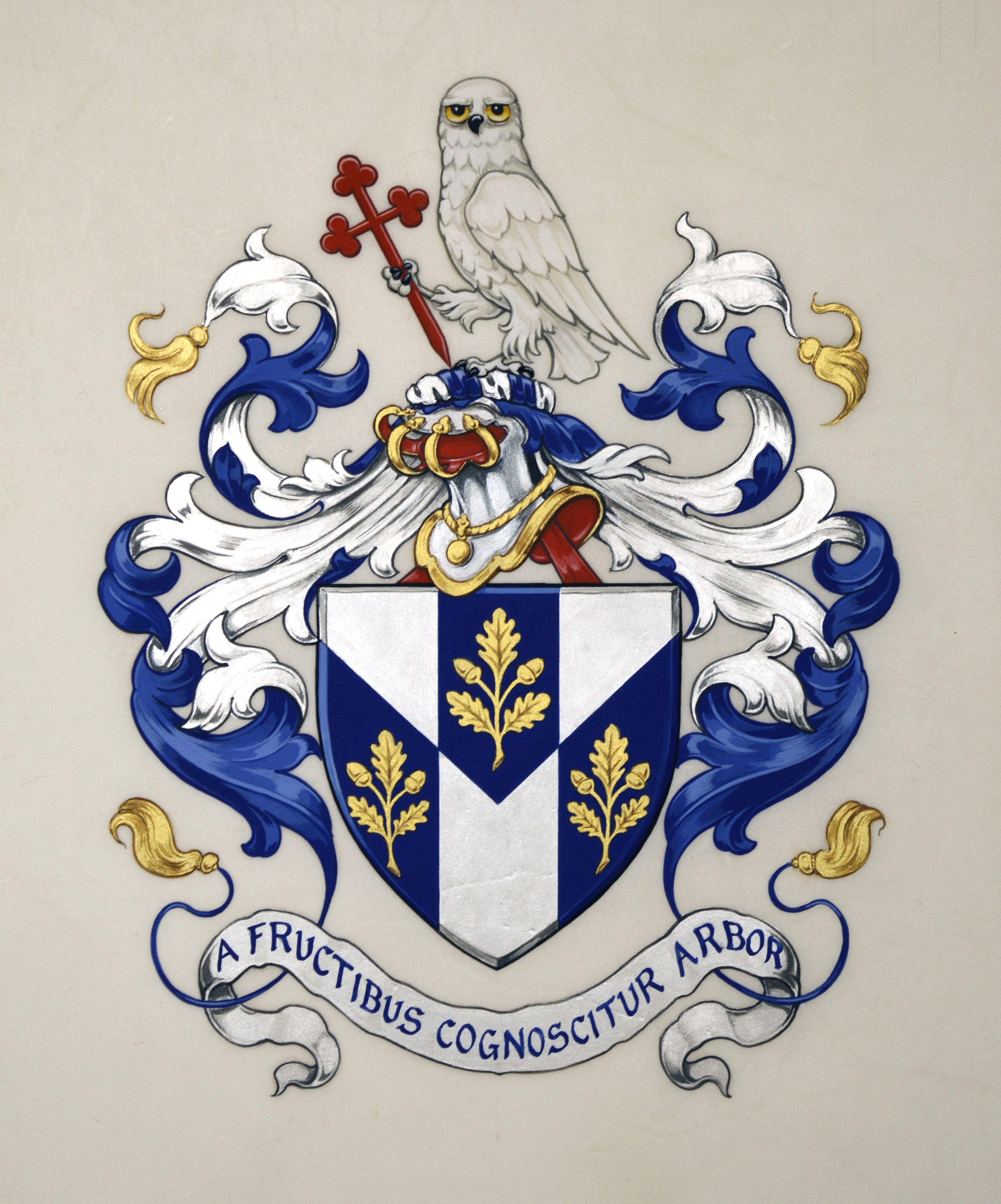 Gedeeld in drieën en omgekeerd kepersgewijs doorsneden van zilver en van lazuur, het lazuur telkens beladen met een eikentak van goud met twee eikels en drie bladeren. Het schild getopt met een helm van zilver, getralied, gehalsband en omboord van goud, gevoerd en gehecht van keel, met wrong en dekkleden van zilver en van lazuur. Helmteken: een sneeuwuil van natuurlijke kleur houdende een klaverbladkruis met spitse voet van keel. Wapenspreuk: A FRUCTIBUS COGNOSCITUR ARBOR in letters van lazuur op een lint van zilver. Gegeven te Brussel op 1 juli 2019